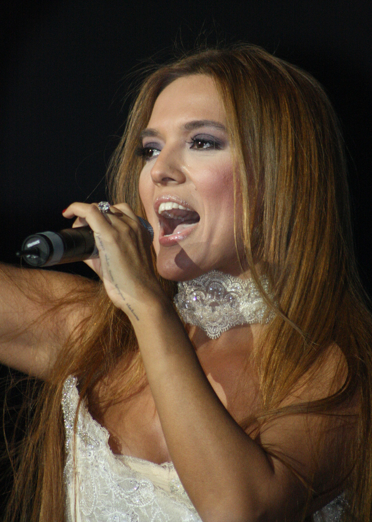 Demet Akalın Konser